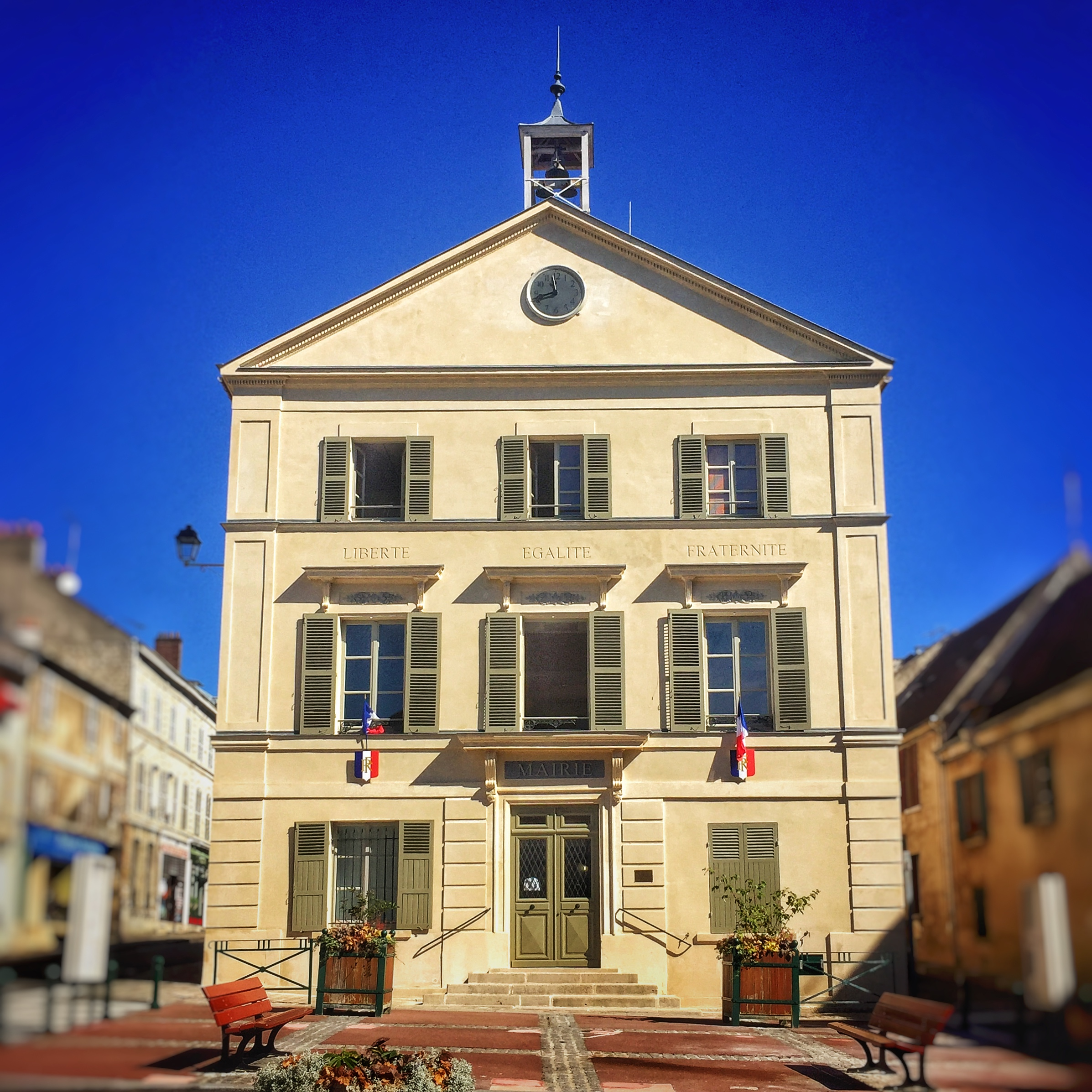 Mairie de Luzarches, rénovée en 2016.